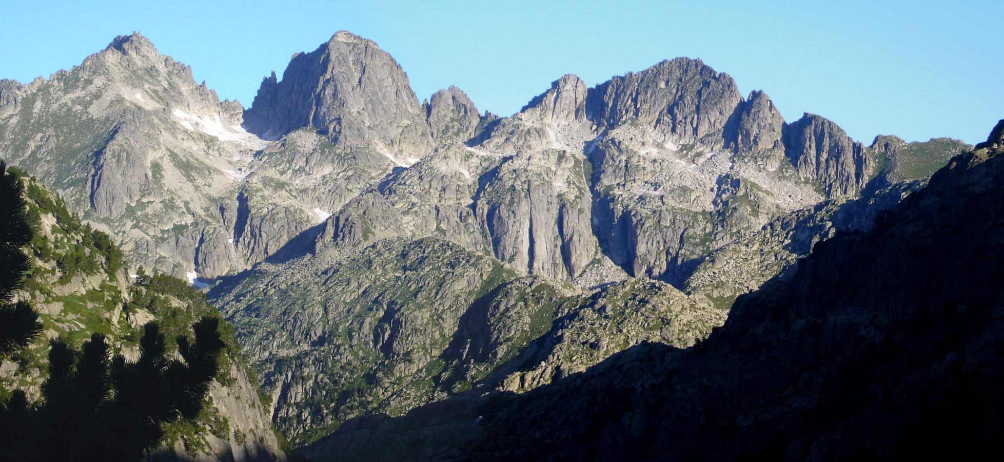 Punta d'Harlé, el Pa de Sucre i Tumeneia, vistos des de la Vall de Colieto; la Vall de Boí, Alta Ribagorça, Catalunya